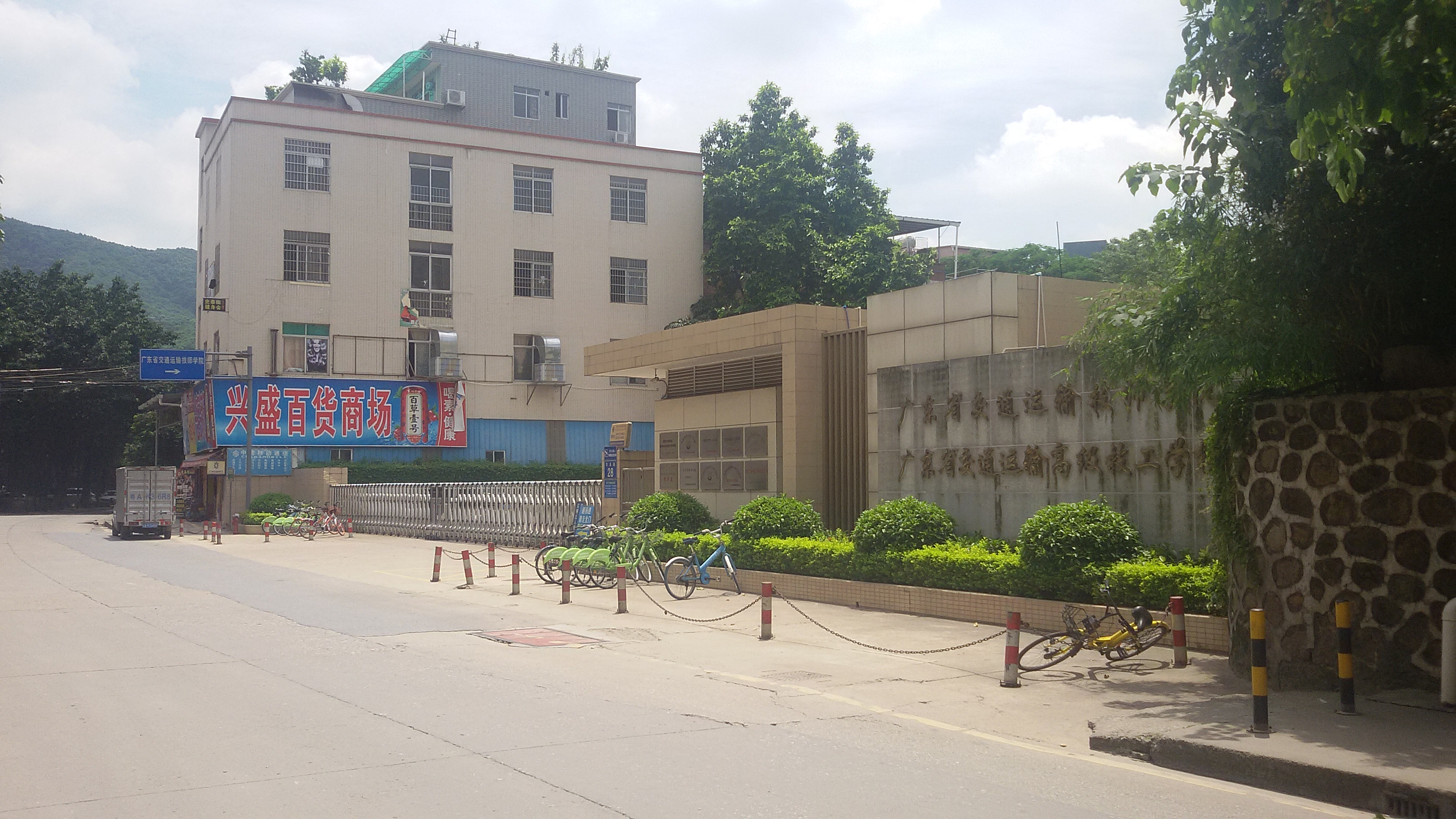 粵語: 廣東省交通運輸高級技工學校大門，廣東省交通運輸技師學院